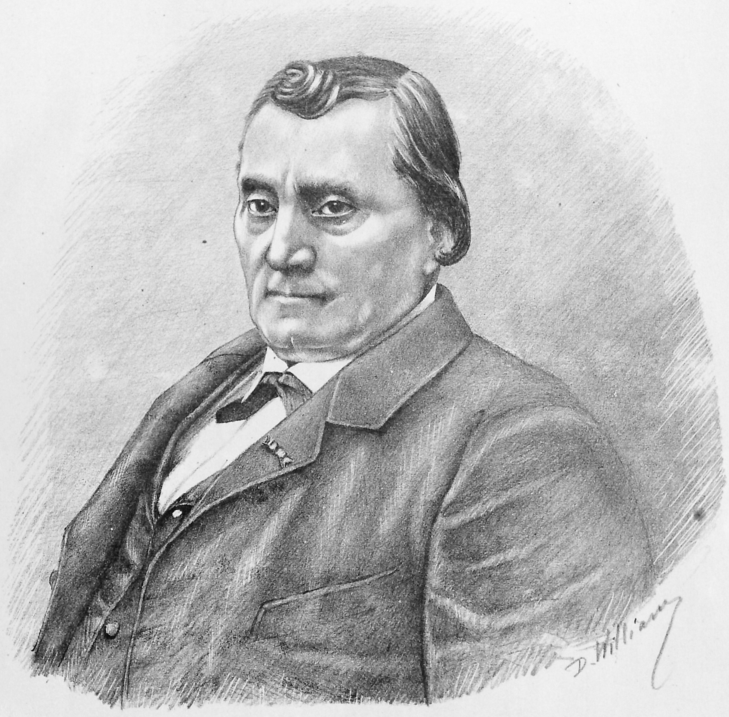 Portraits contemporains avec autographes : Politique, armée, clergé, letters, théatres & arts dessines & lithographies par D. William Bukarest, 1881 Millo - Artiste dramatique